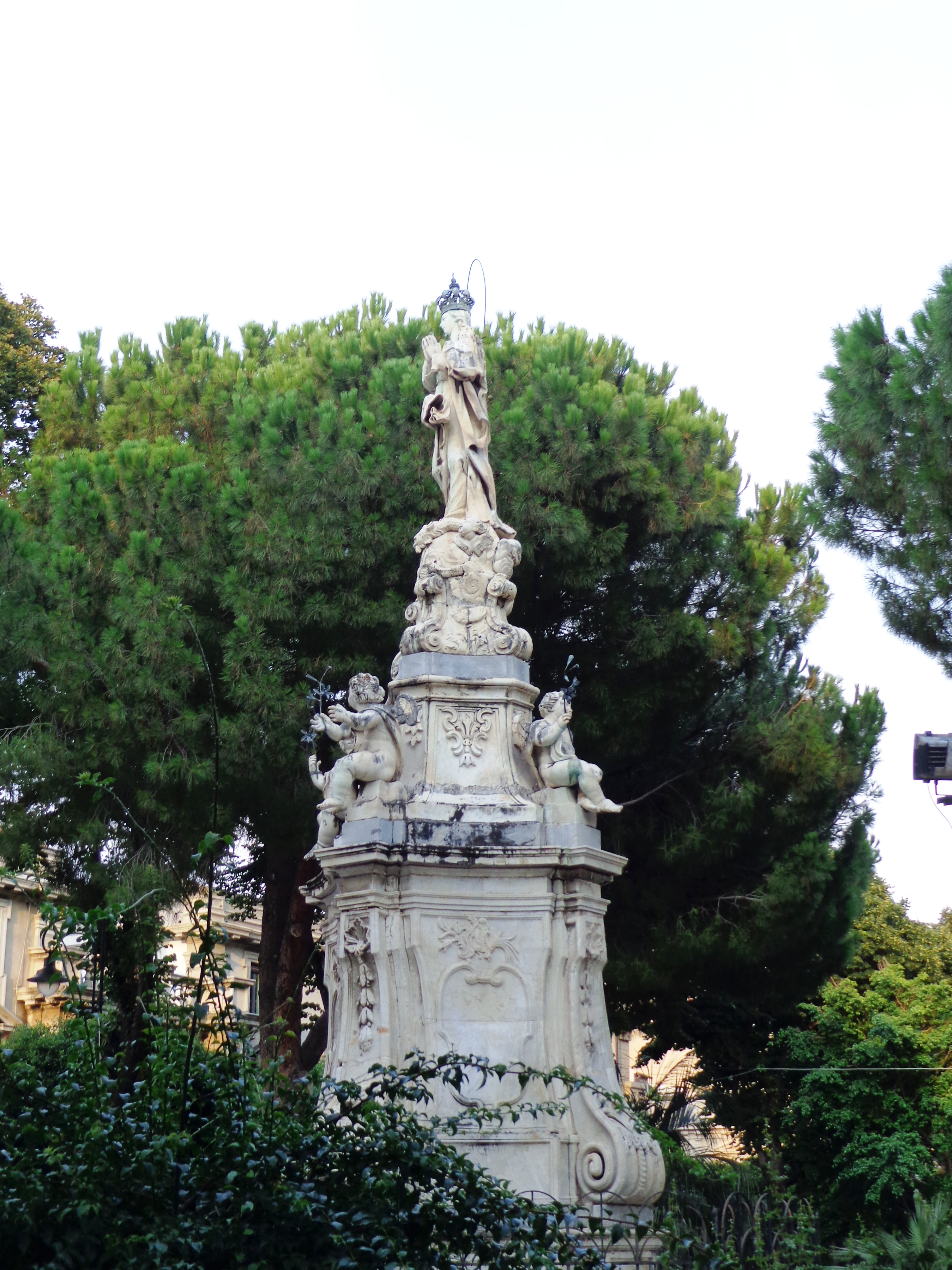 Messina: la Colonna dell'Immacolata, o anche Statua dell'Immacolata, Guglia dell'Immacolata, Obelisco dell'Immacolata, ripresa dal campanile del Duomo.